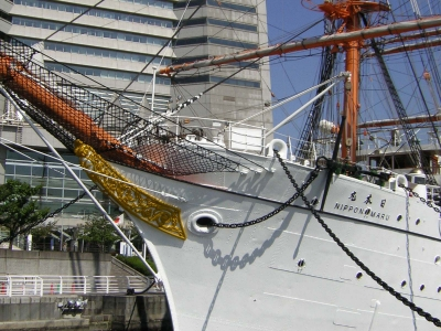 Nippon Maru, Yokohama